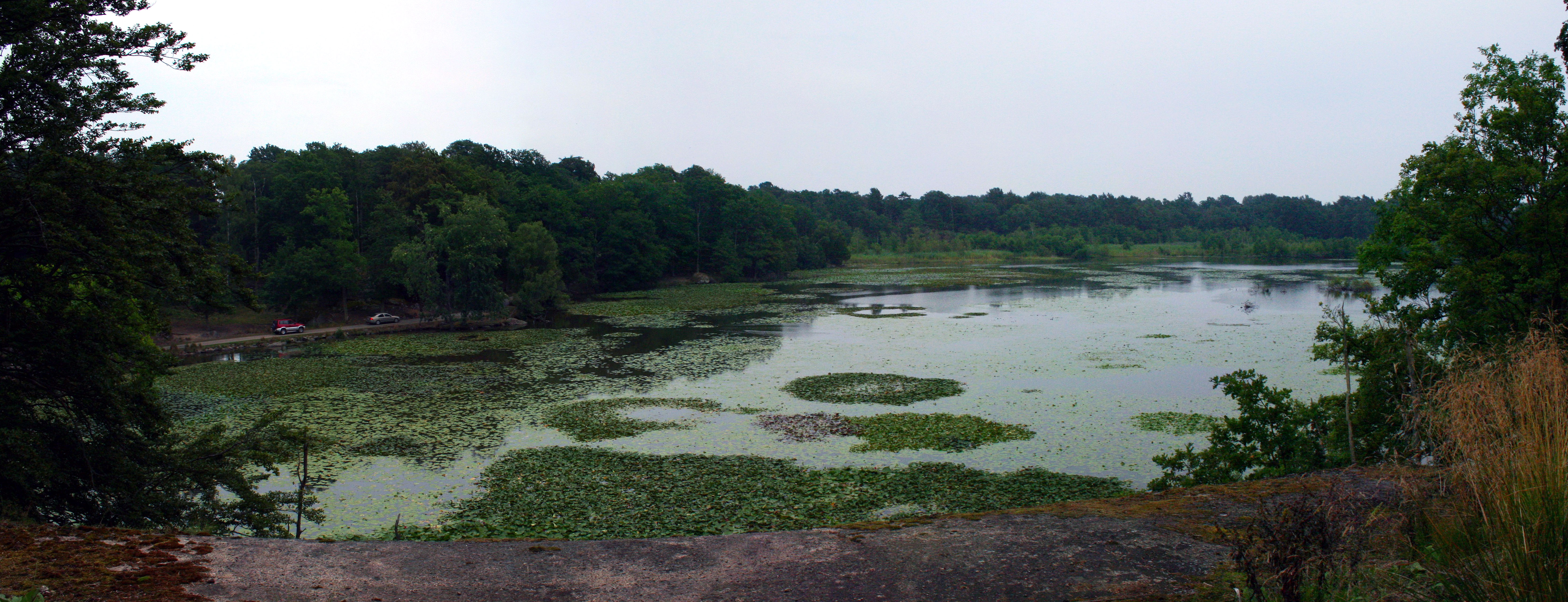 Färsksjön, Eriksberg, Blekinge